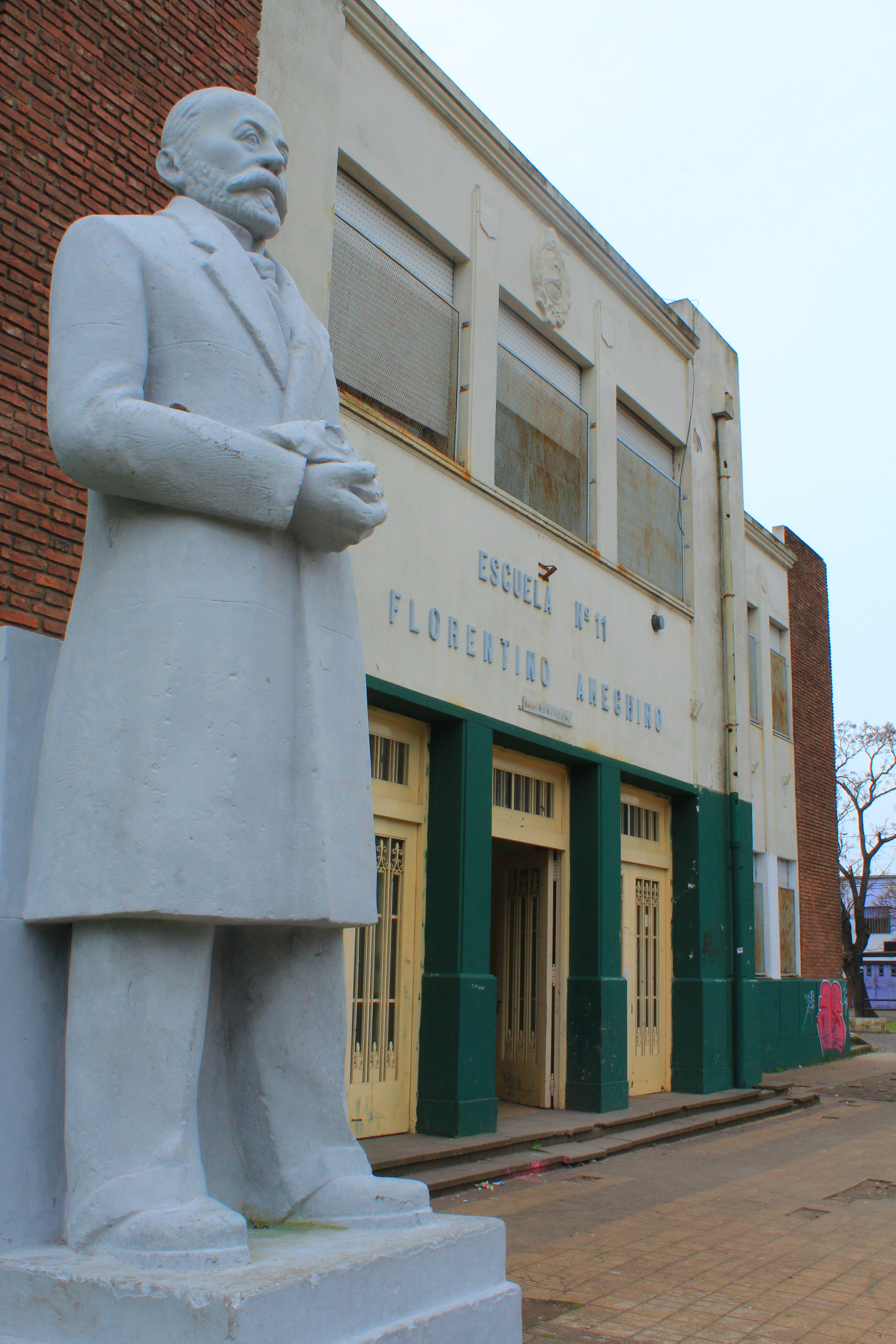 Escuela N.º 11 "Florentino Ameghino"